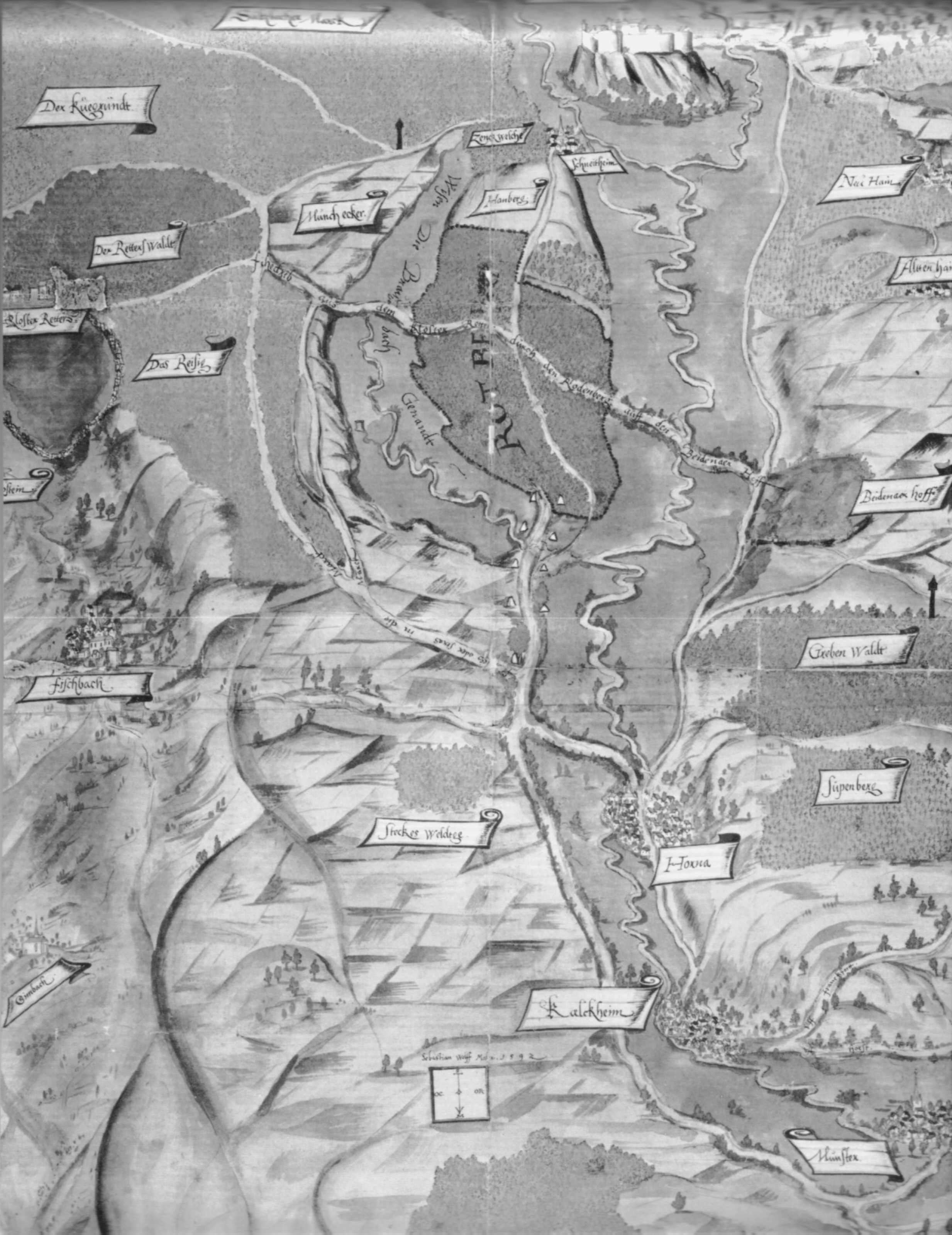 Karte von Kelkheim und Umgebung aus dem 16. Jahrhundert